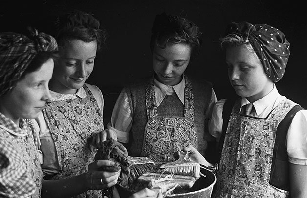 Teitl Cymraeg/Welsh title: Plant ysgol Wem yn dysgu sut i arddio a gwneud gwaith tŷ Cyfrwng/Medium: Negydd ffilm / Film negative Cyfeiriad/Reference: (gcc04949) Rhif cofnod / Record no.: 3472768 Rhagor o wybodaeth am gasgliad Geoff Charles yn Llyfrgell Genedlaethol Cymru More information about the Geoff Charles Collection at the National Library of Wales Mae ffotograffau Geoff Charles hefyd yn rhan o Broject Europeana Libraries, cliciwch yma am fwy o wybodaeth Geoff Charles' photographs also form part of the Europeana Libraries Project, click here for more information